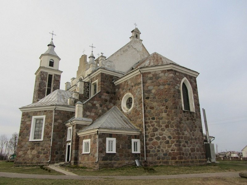 Радунь. Касцёл Маці Божай Ружанцовай